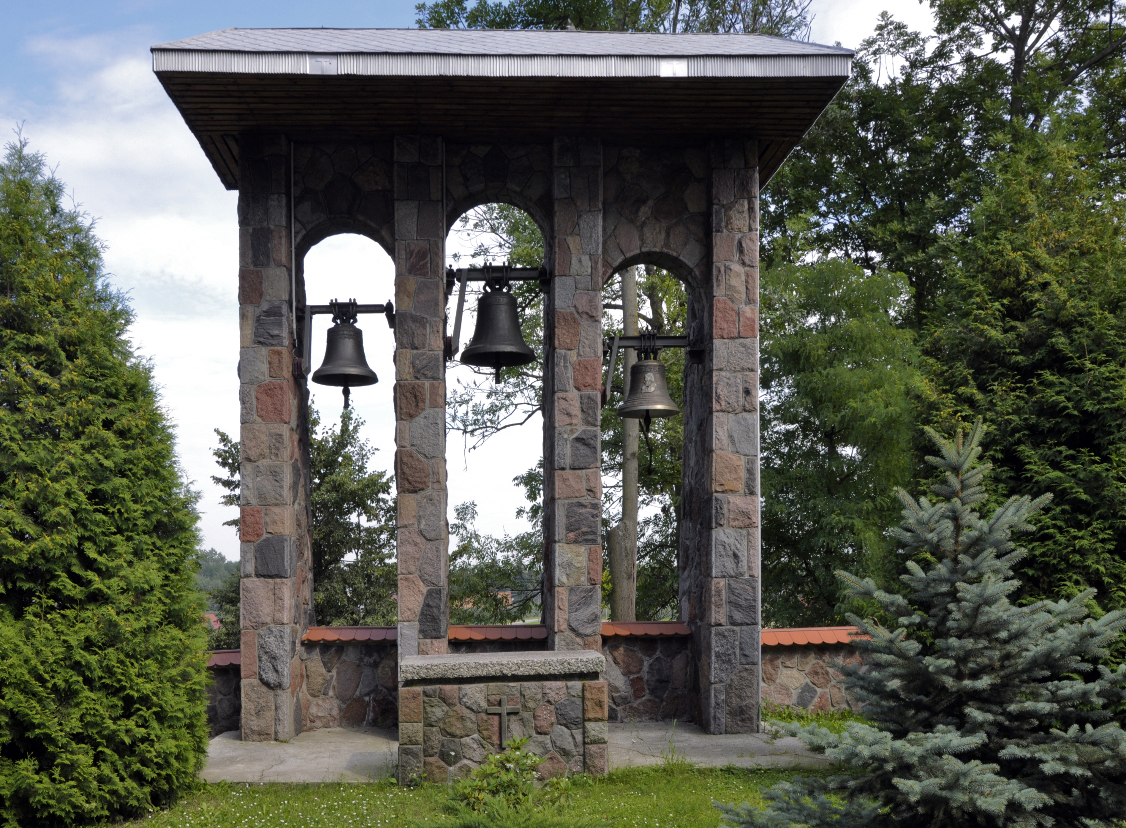 Konary (powiat grójecki), woj. mazowieckie, gmina Warka